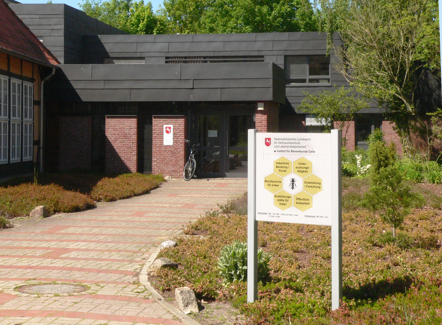 Eingangsbereich des Instituts für Bienenkunde Celle